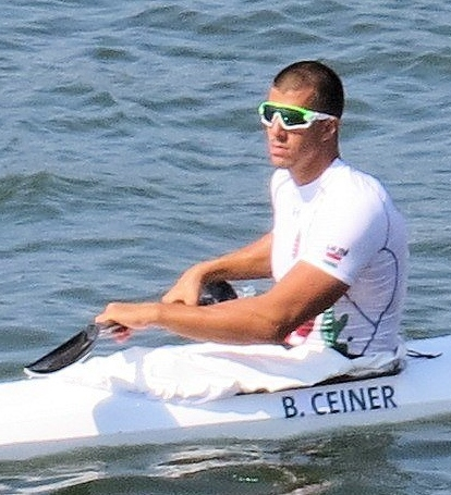 Sx50